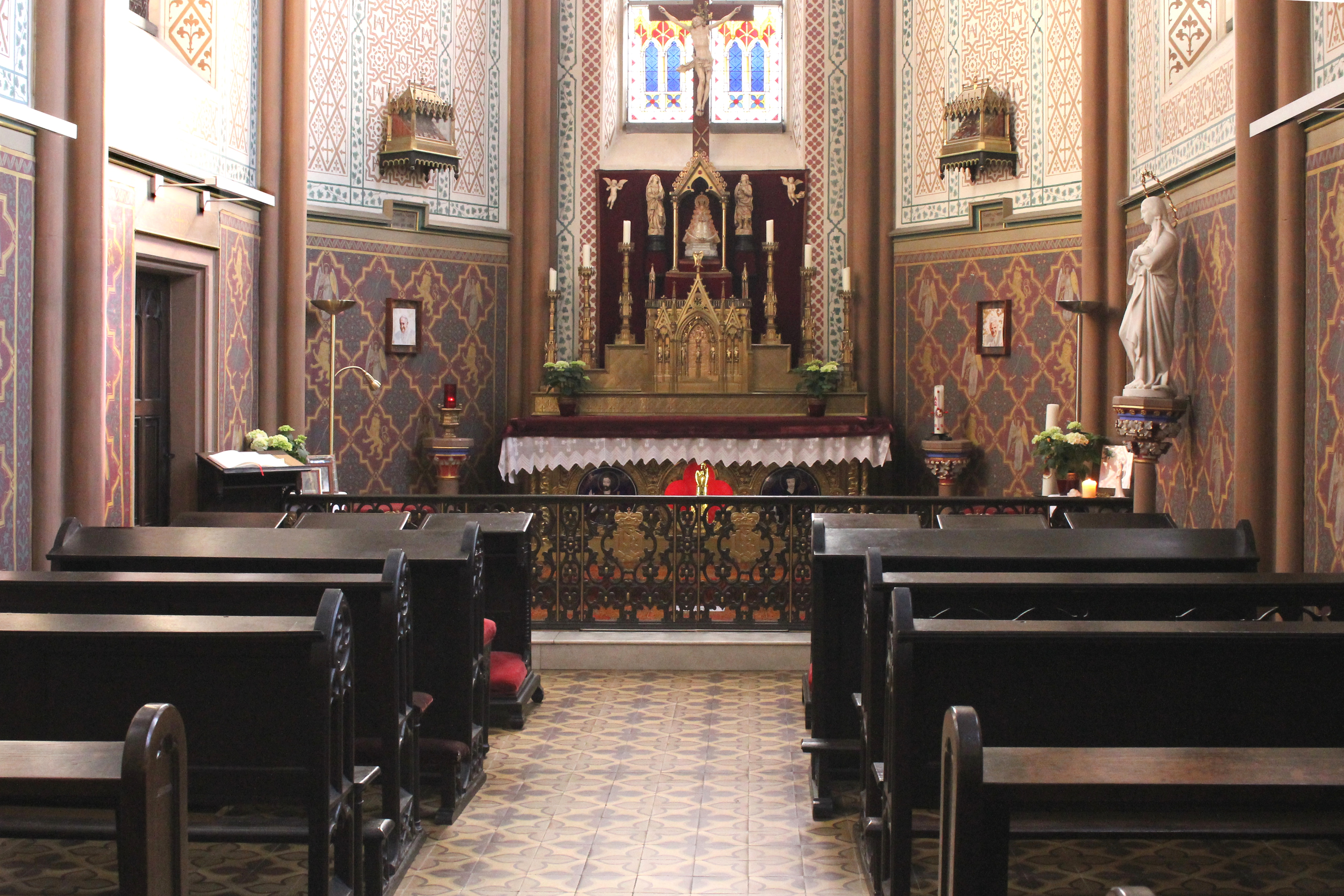 Schlosskapelle von Sayn